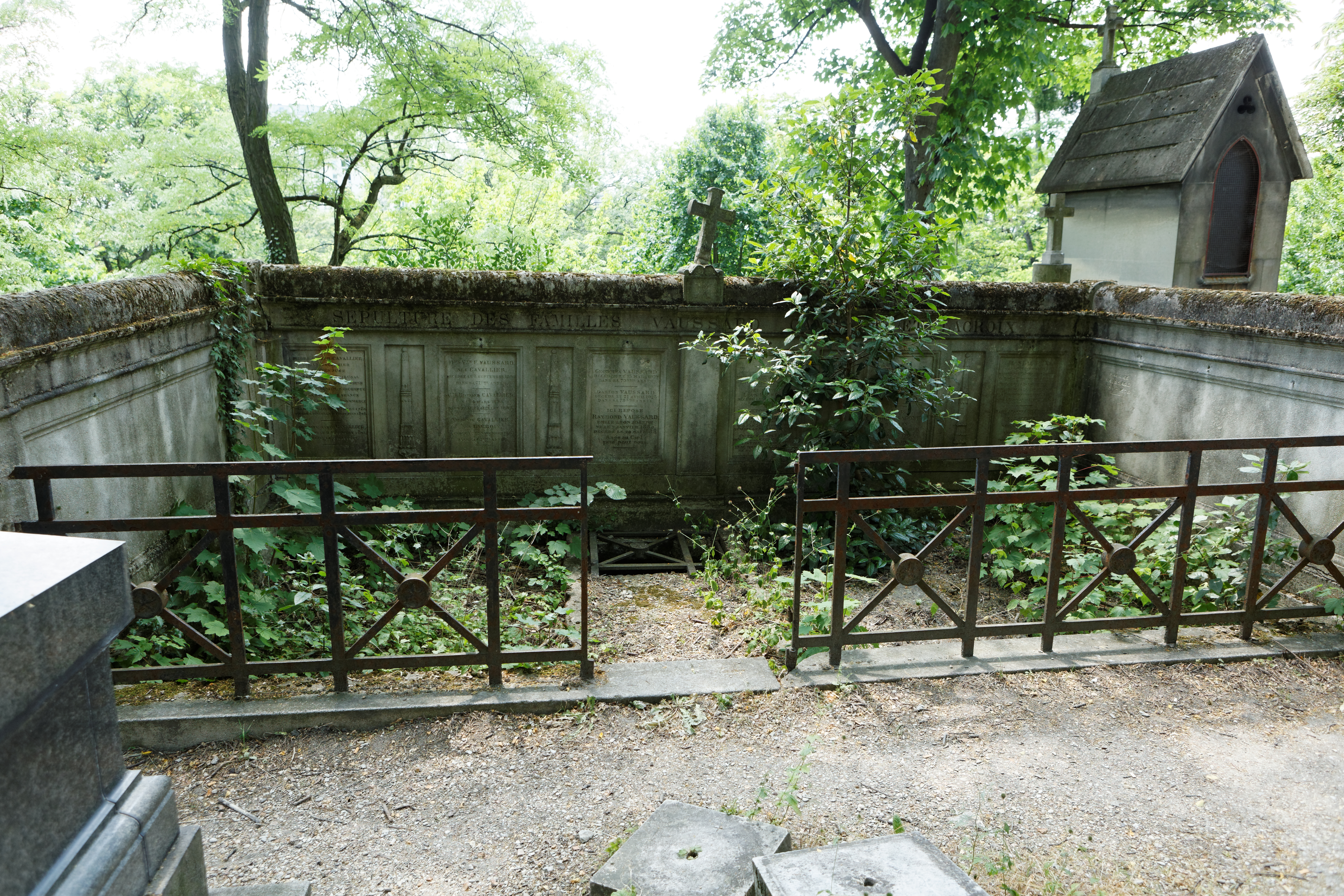 Sépulture de Jean Lacroix (1766-1854), chirurgien de l'impératrice Joséphine et médecin du ministère de la Guerre ; Pierre-Joseph Cavallier (1782-1826), juge au tribunal de commerce de la Seine ; Maurice Vaussard (1888-1978), écrivain et essayiste spécialiste de l’histoire italienne et de la Démocratie chrétienne.